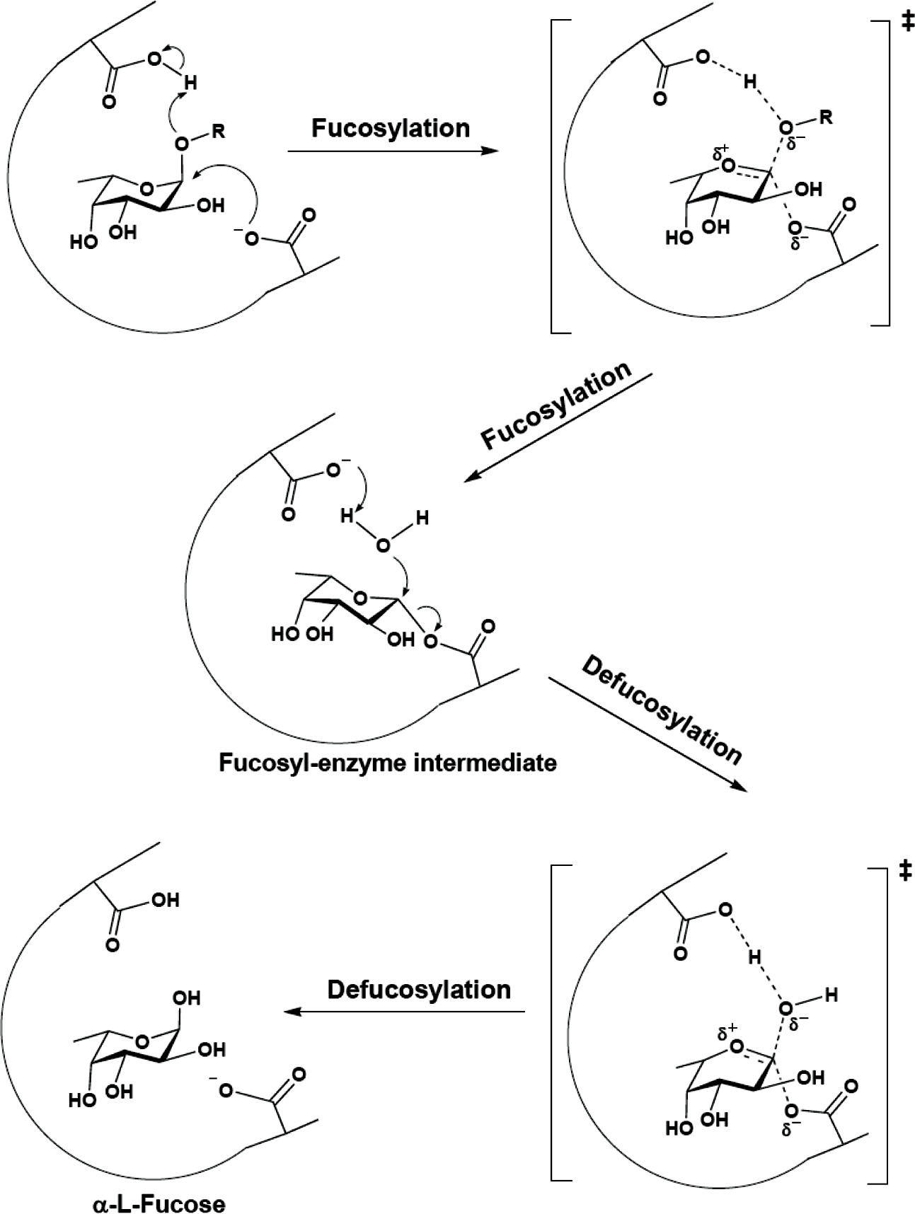 alfa fucosidase catalise